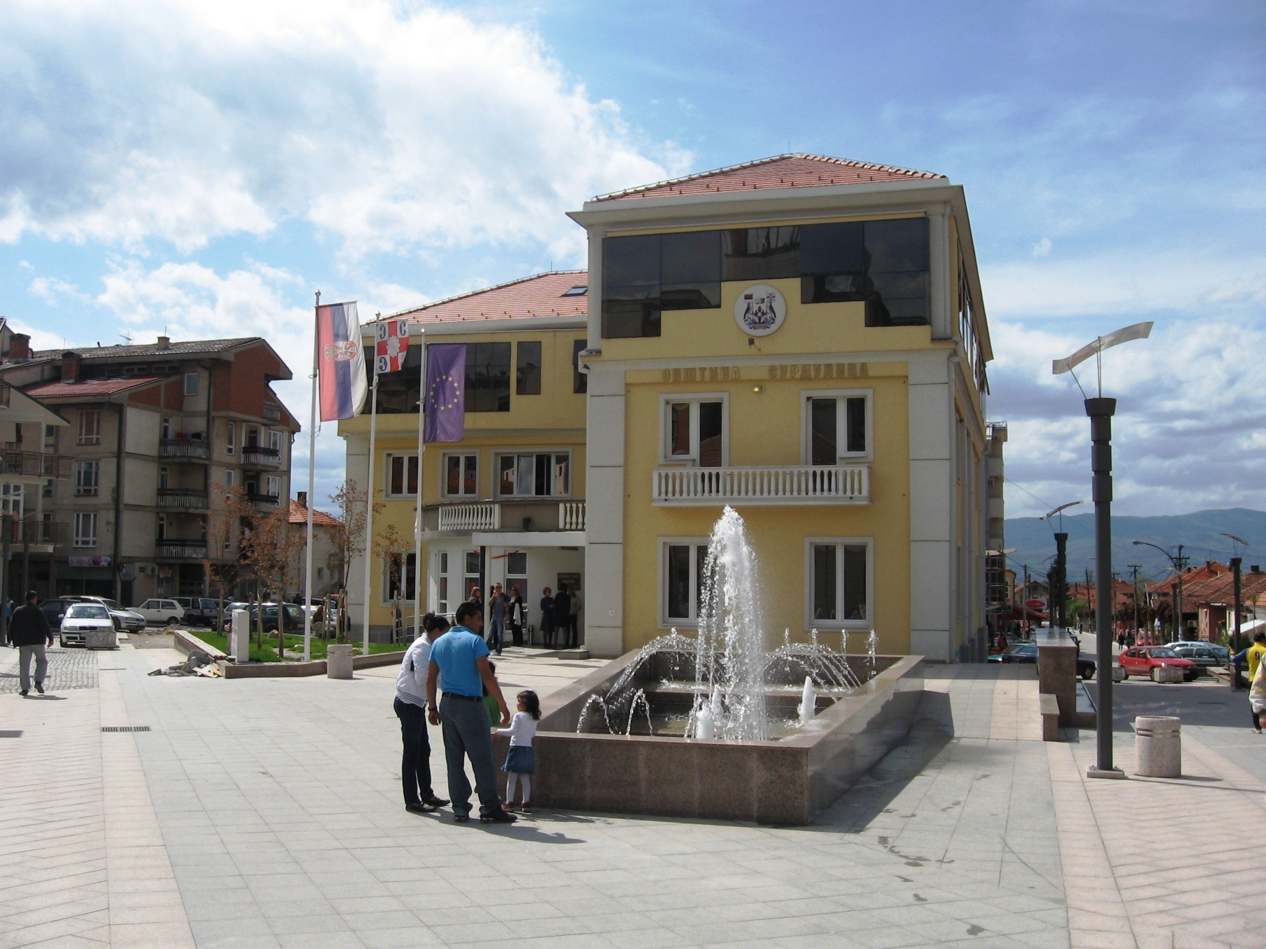 Здање општине Сурдулица.